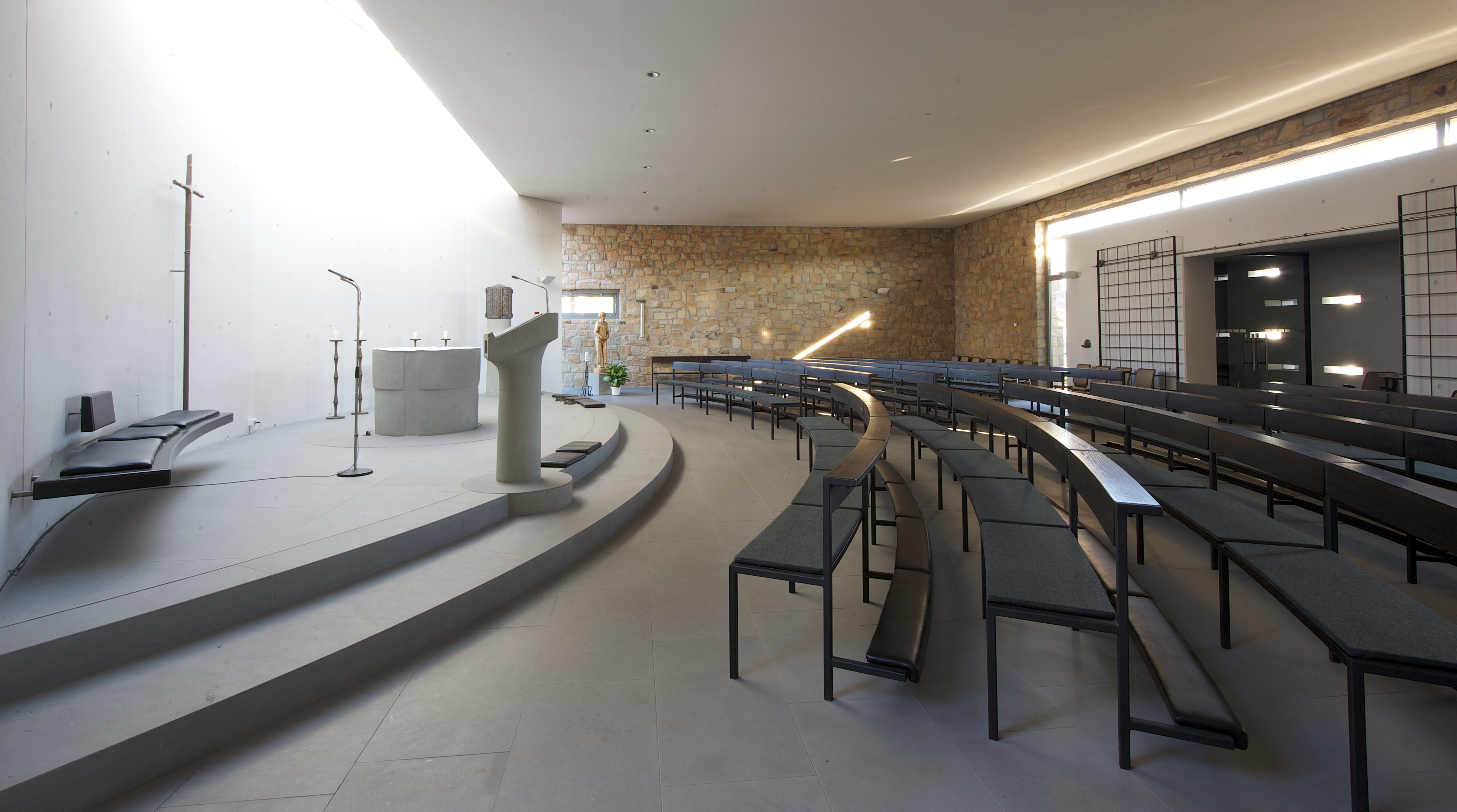 Innenraum der ehemaligen Maximilian-Kolbe-Kirche in Bad Lippspringe bei Paderborn